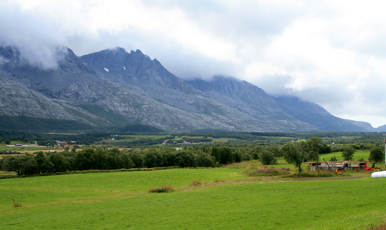 Parti fra Alsten, Alstahaug, Nordland. De sju søstre i bakgrunnen.